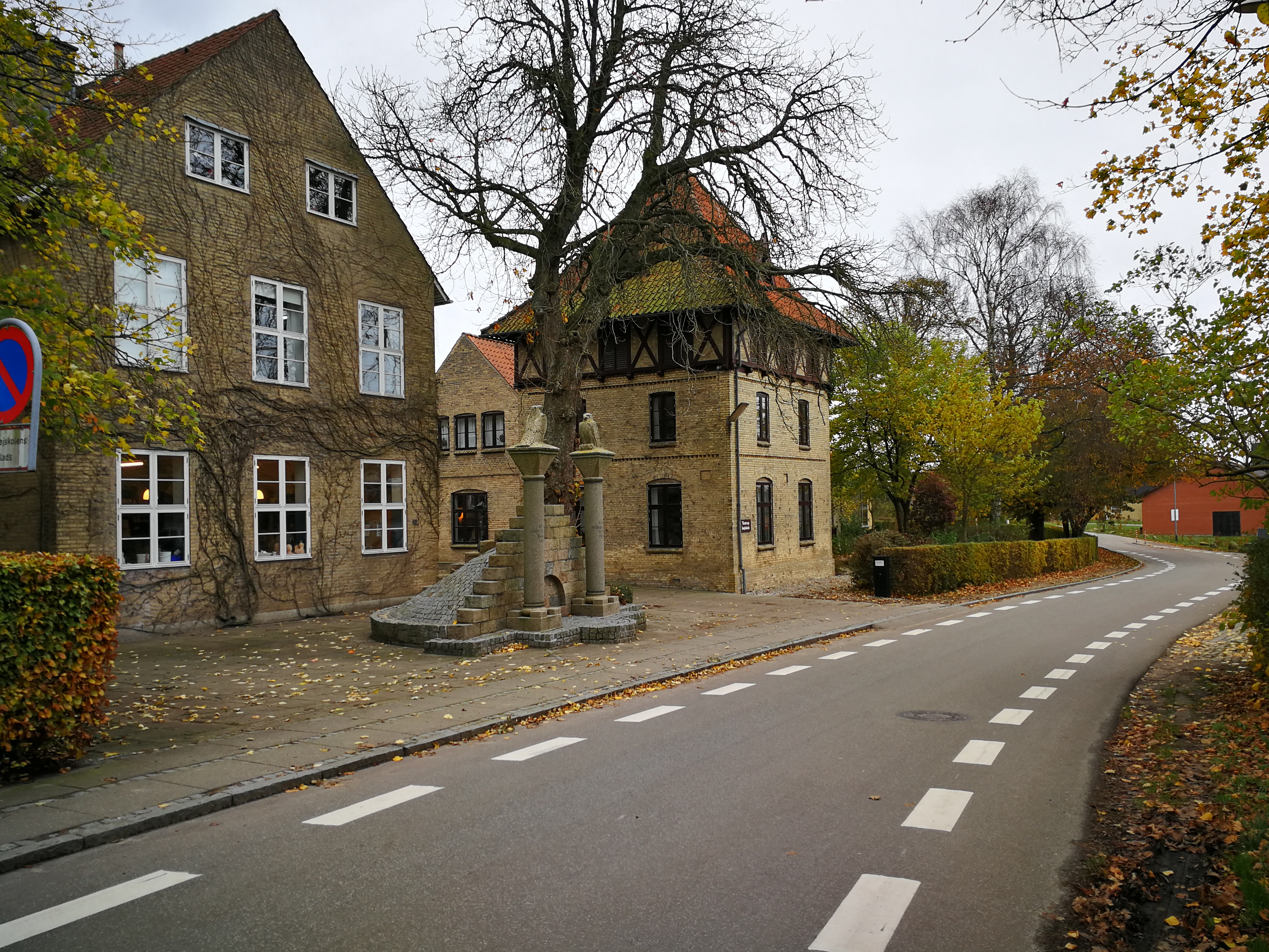 Testrup Højskole ved Mårslet